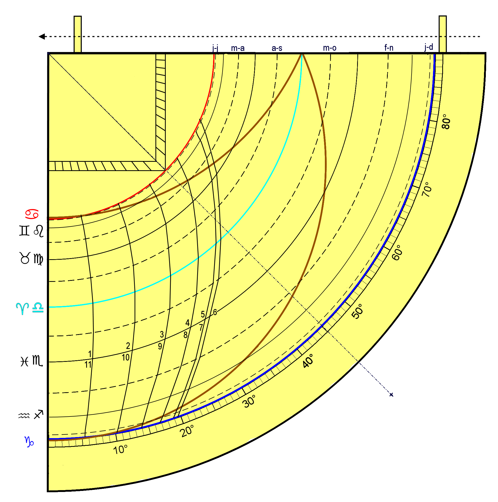 Quadrant Vetustior théorique pour une latitude de 47° et l'année 1150.